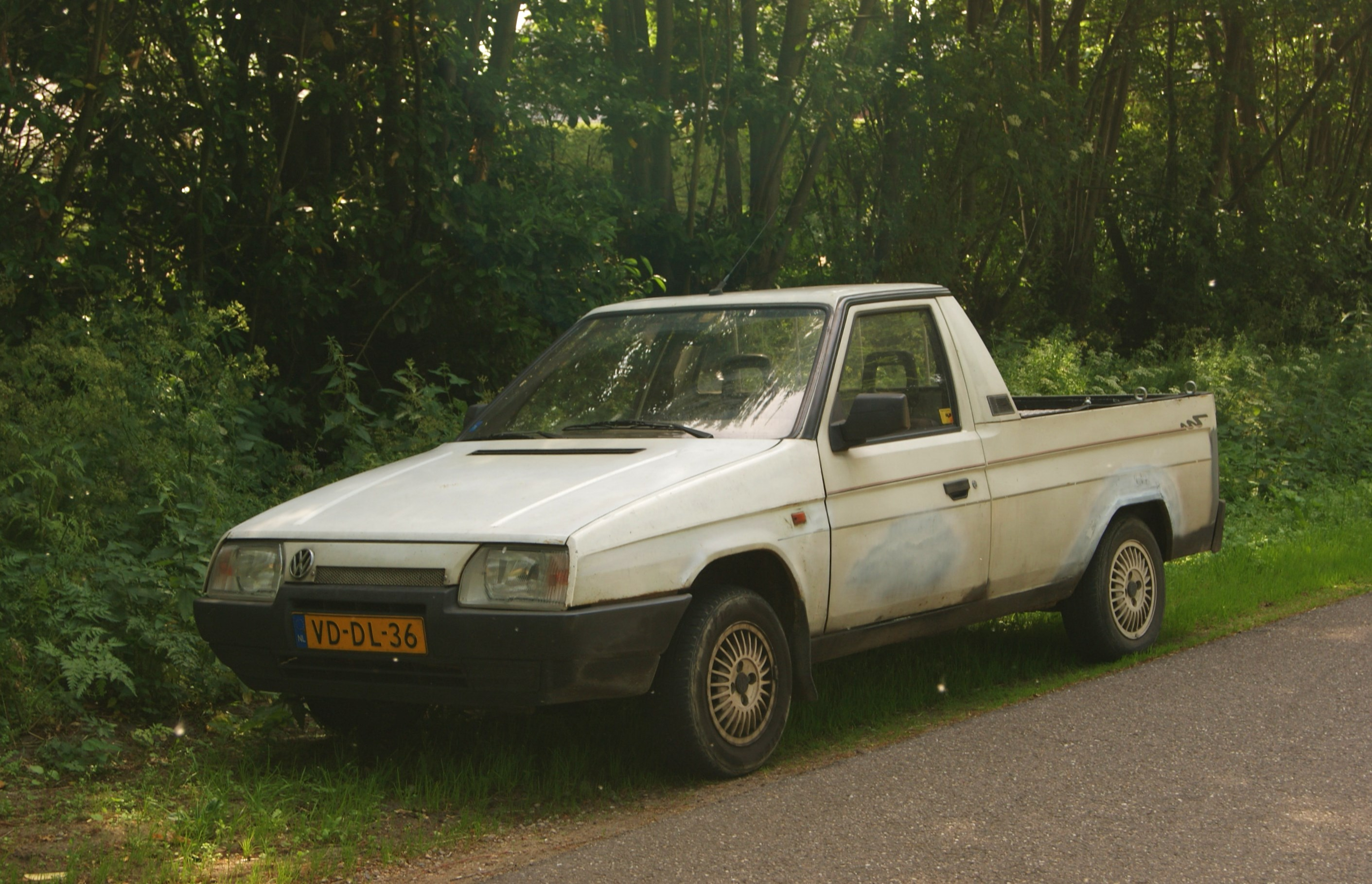 VD-DL-36